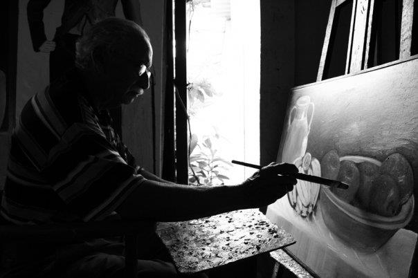 Fotografía en blanco y negro.